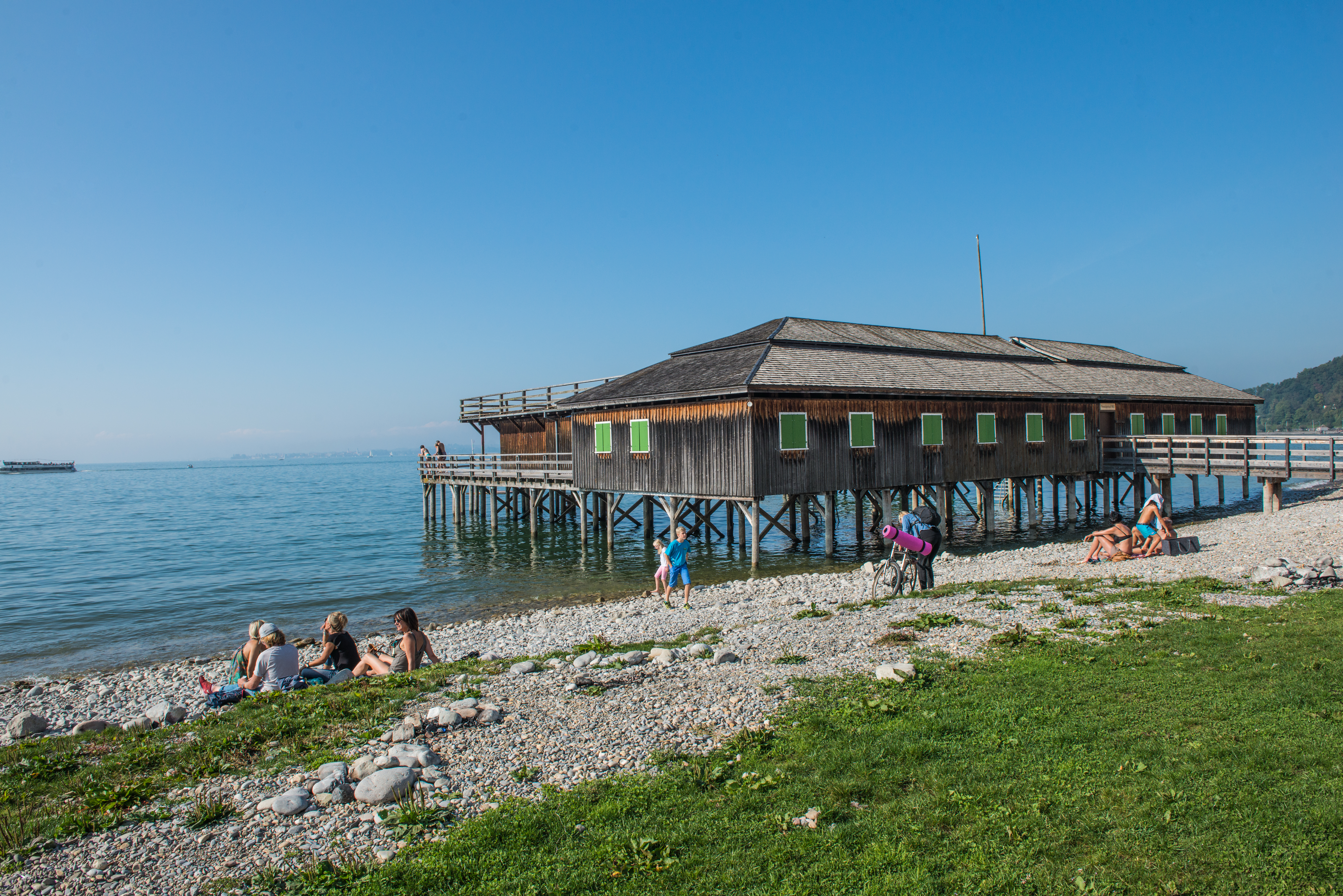 Ehemals Militärbad (Mili) an der Reichsstraße in Bregenz. Dieses Bild wurde anlässlich des österreichischen Tags des Denkmals 2016 in Vorarlberg eingereicht.